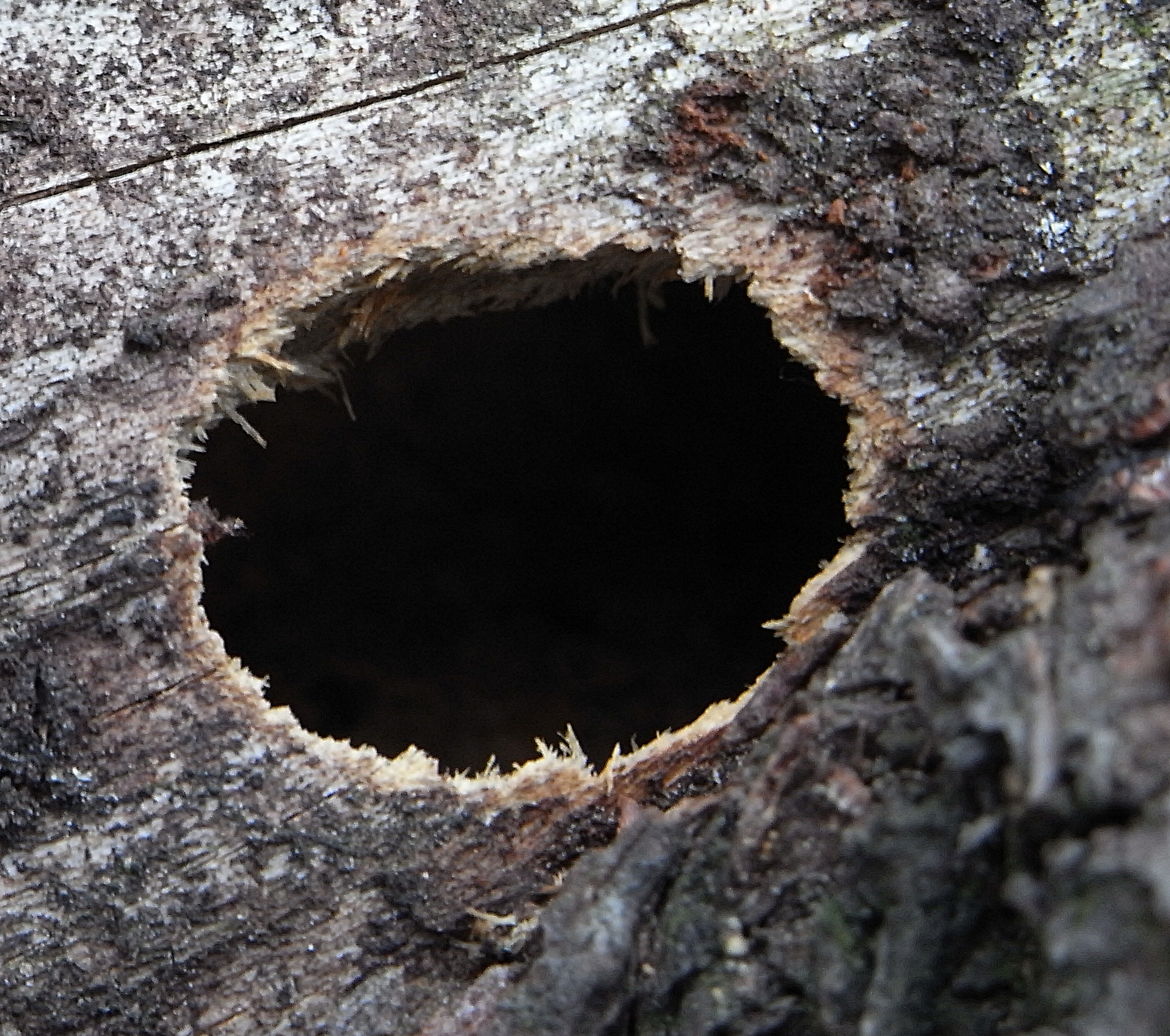 Ausschlupfloch von Ergates faber in abgestorbener Kiefer aus SüdfrankreichRicoh R8